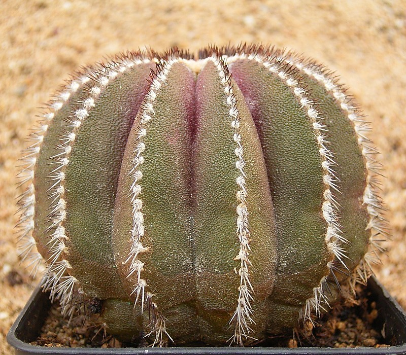 Uebelmannia pectinifera ssp. pectinifera